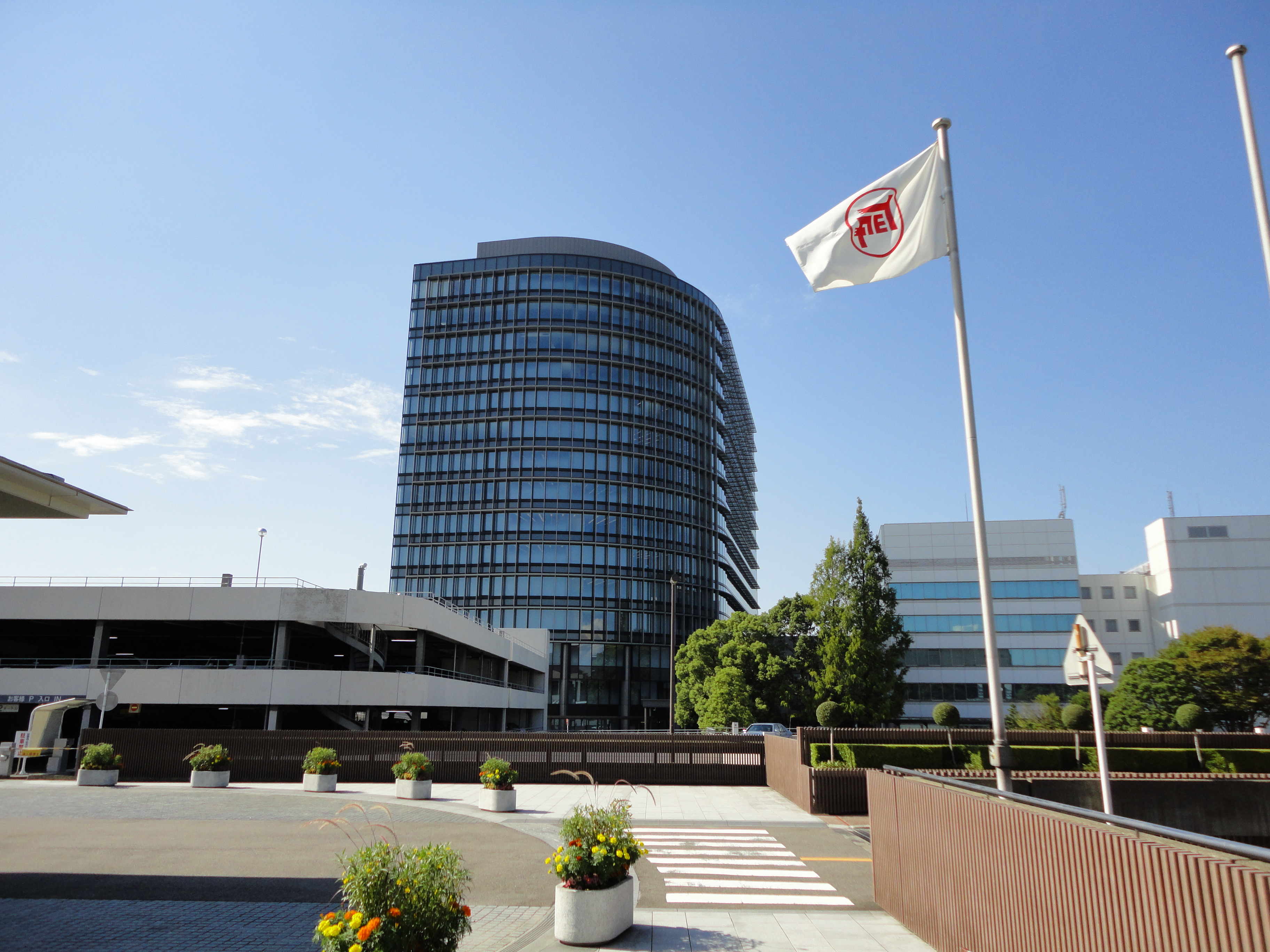 トヨタ本社